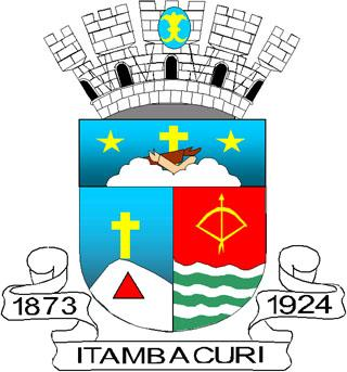 Brasão de Itambacuri - MG